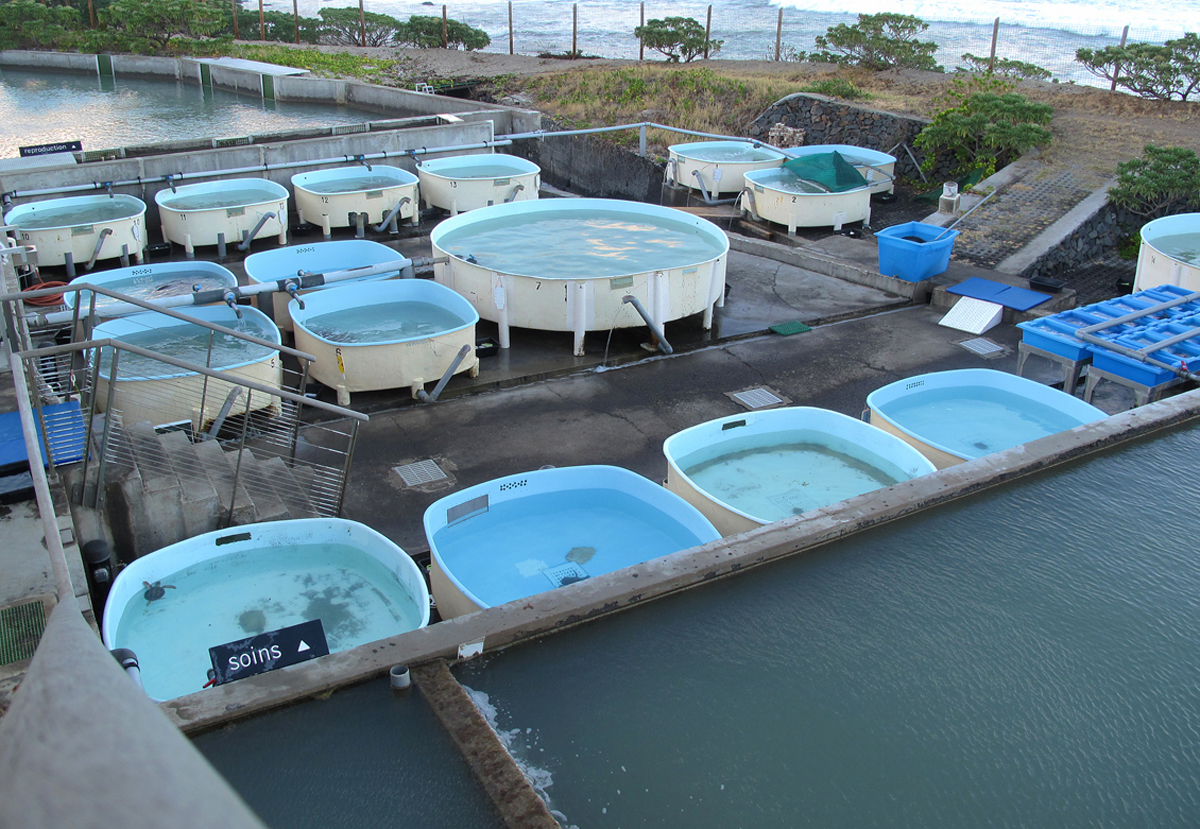 Les bacs du centre de soins à l’observatoire des tortues marines Kélonia, à la Réunion.